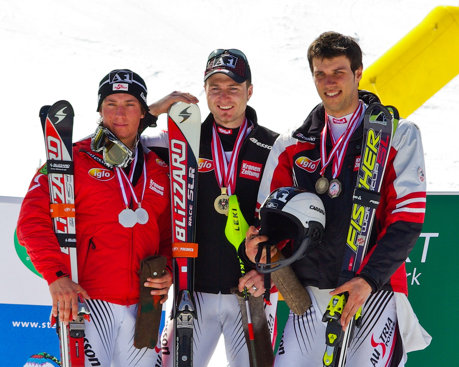 Die Sieger des Slaloms der Österreichischen Alpinen Skimeisterschaften 2008: 1. Platz: Reinfried Herbst (mitte), 2. Platz: Marcel Hirscher (links), 3. Platz: Mario Matt (rechts)